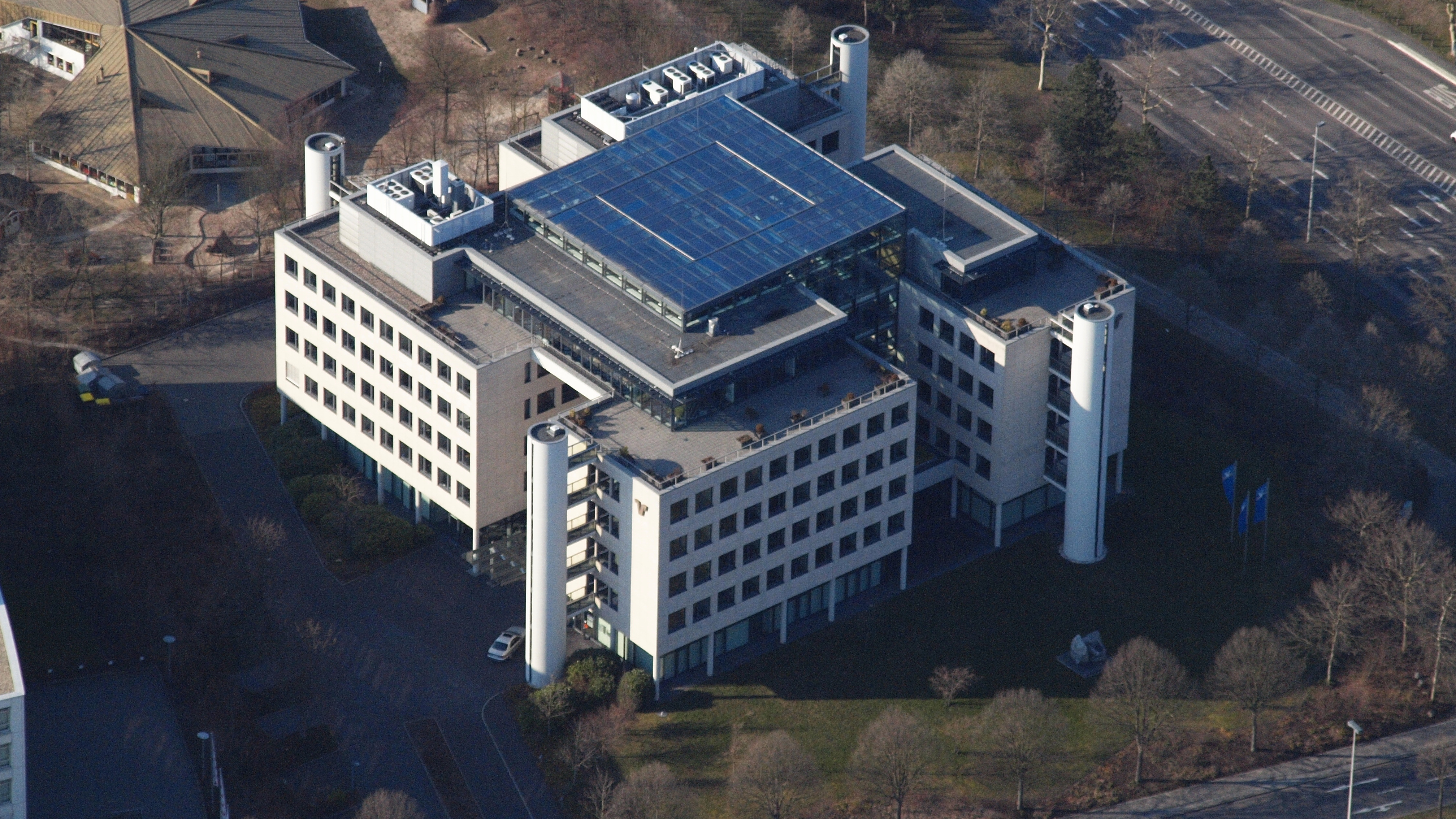 Volksbank Bonn Rhein-Sieg in Bonn, Ortsteil Hochkreuz: Luftaufnahme